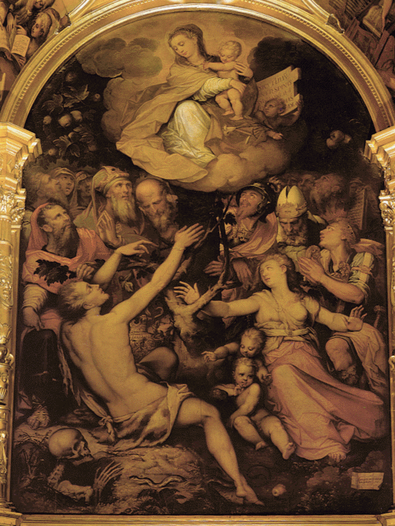 Alegoría de la Inmaculada Concepción.label QS:Les,"Alegoría de la Inmaculada Concepción."